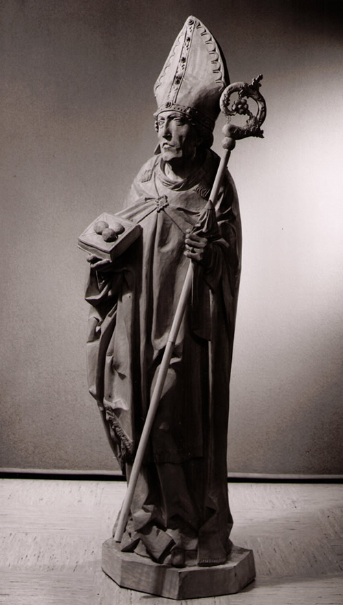 Skulptur_Abformen